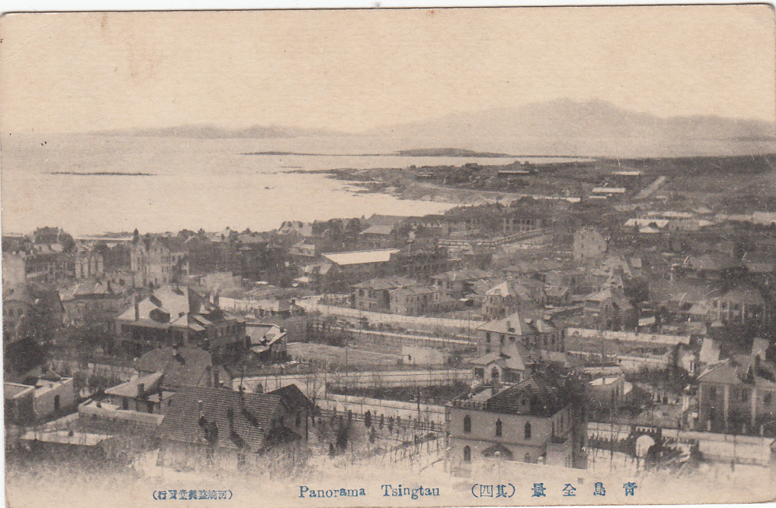 青島之風景